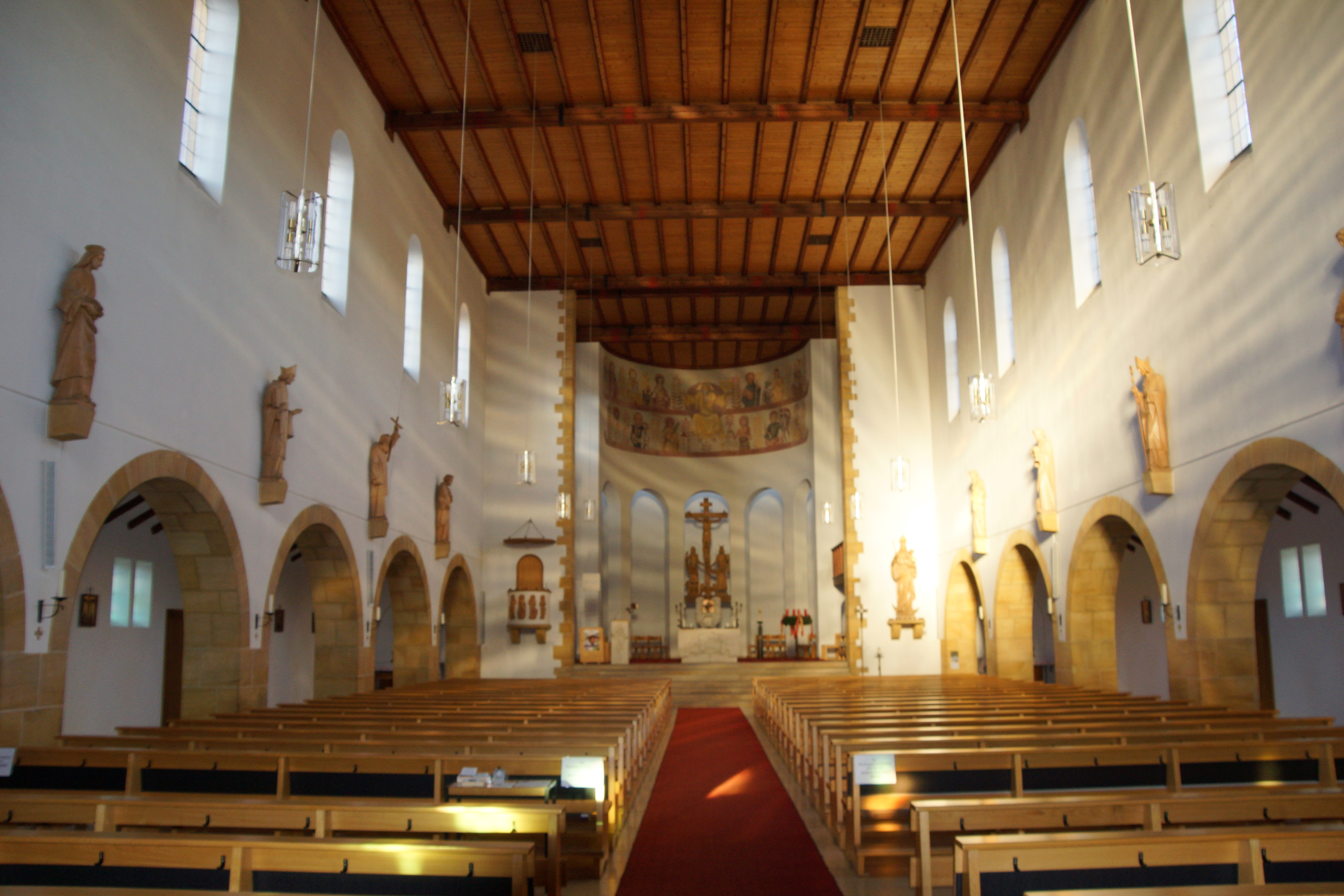 Die Pfarrkirche St. Barbara in Bodenwöhr